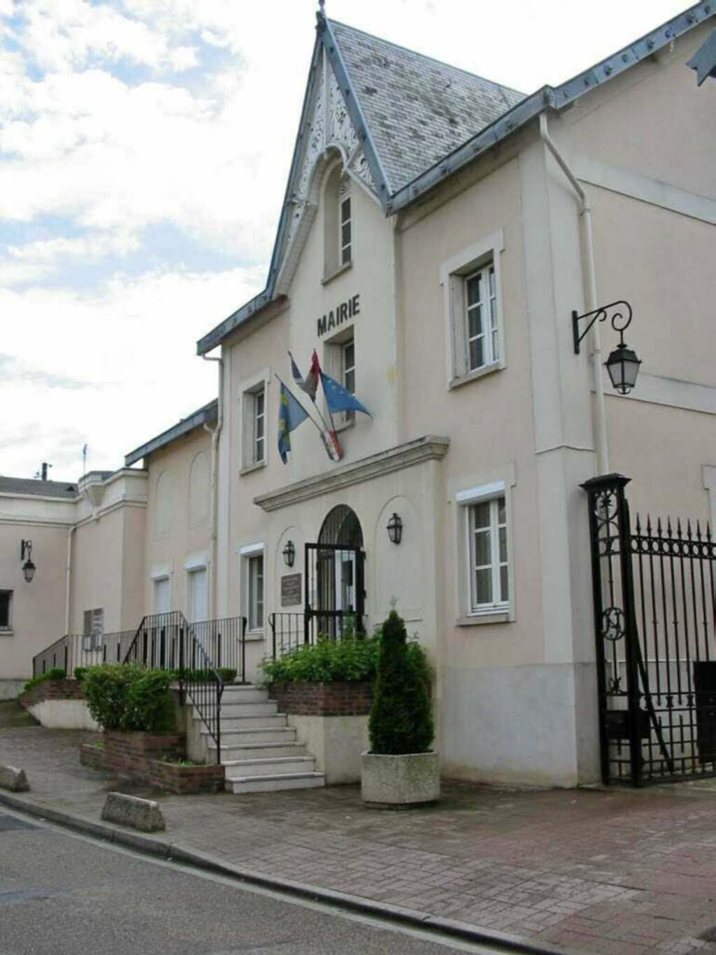 Mairie de La Falaise (Yvelines) (ancienne résidence Aigue Flore) Photo JH Mora, mai 2005